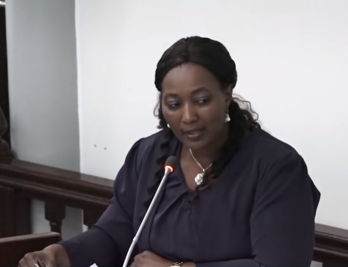 Diana Pokie